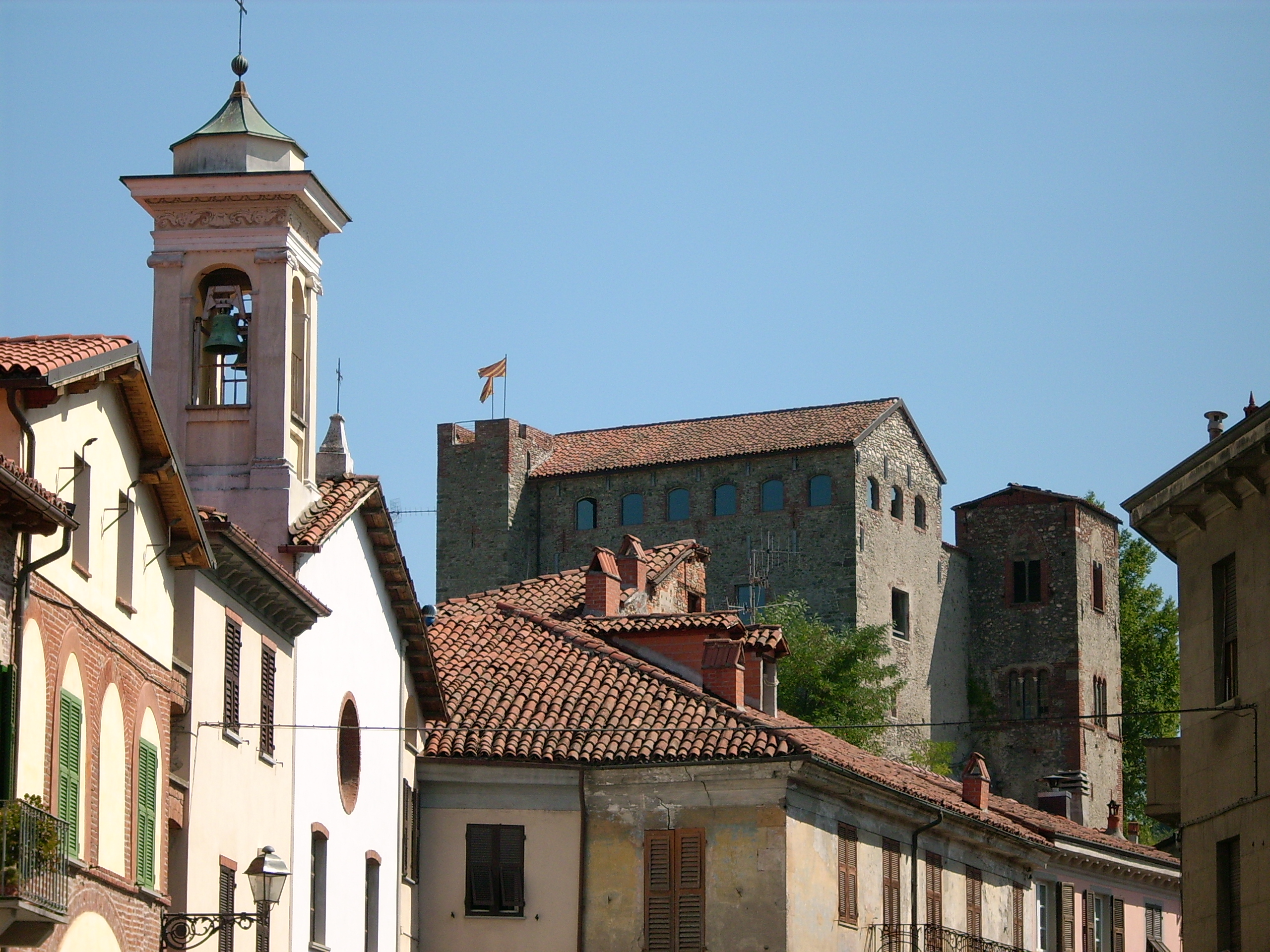 Castello di Millesimo, Liguria, Italia